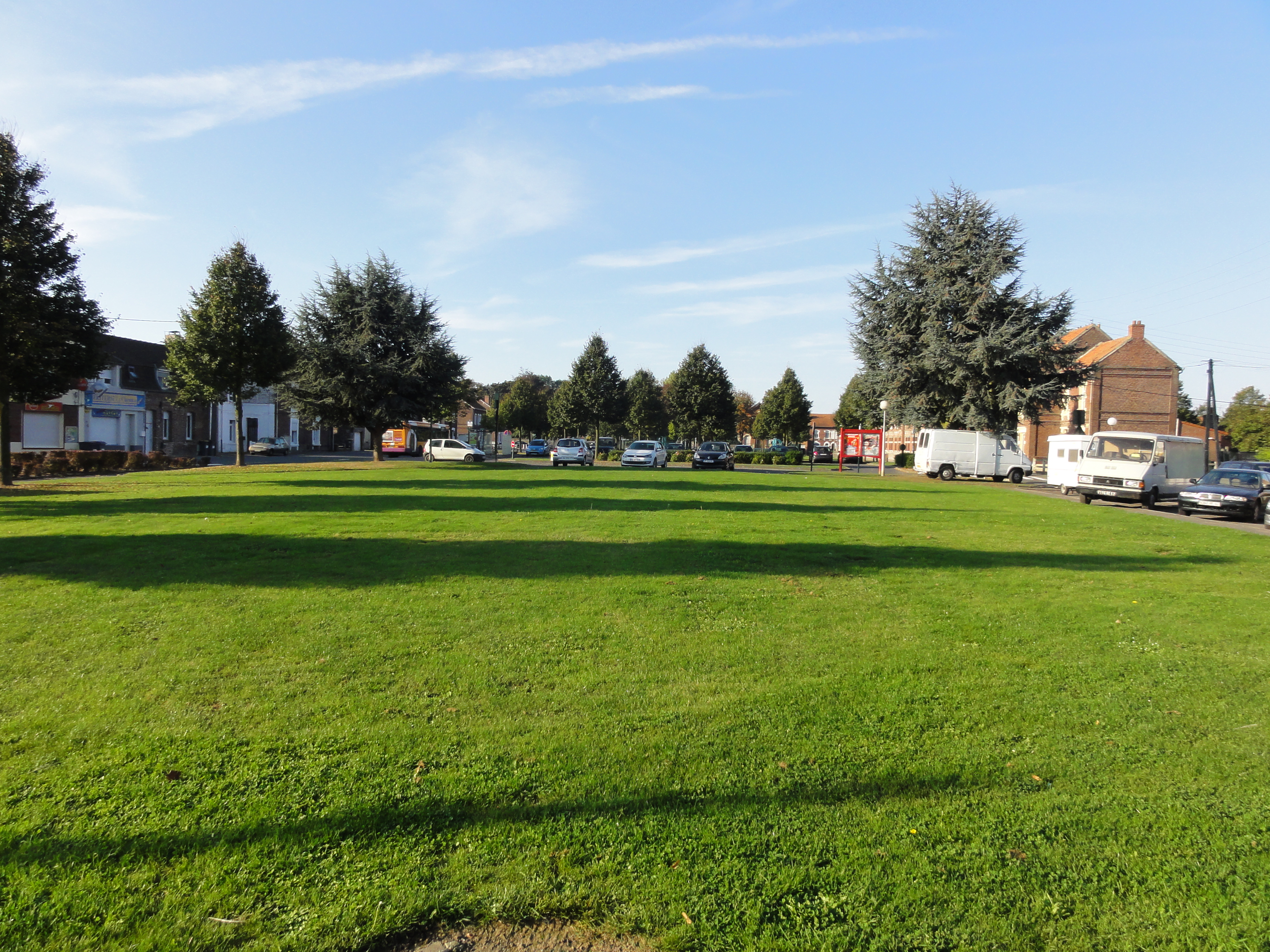 Église des cités de la Fosse n° 1 - 1 bis de la Compagnie des mines de La Clarence, disparue, Divion, Pas-de-Calais, Nord-Pas-de-Calais, France.